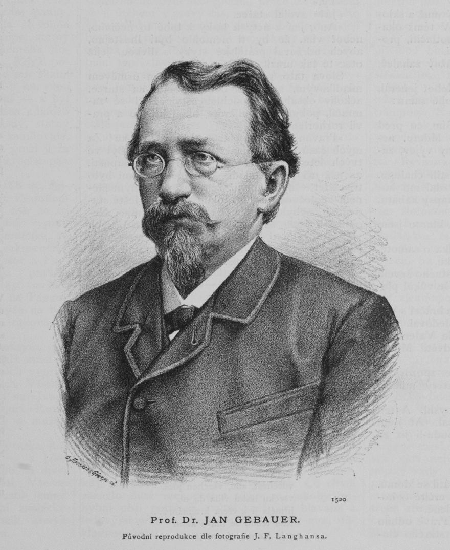 Jan Gebauer, professeur de tchèque à l'Université de Prague (1838-1907)